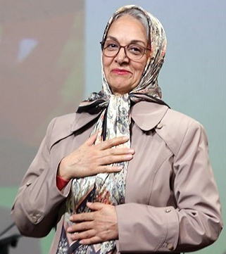 مینا افتاده - مراسم جشن ۱۹ سالگی خانه موسیقی ۶ بهمن ۱۳۹۷ تالار ایوان شمس